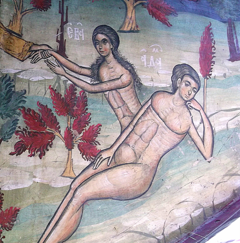 Suczawica (Sucevita), monastyr, fragment fresku, stworzenie Ewy